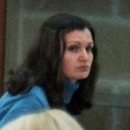 Margareta Muresan, Schacholympiade 1980 in Valetta auf Malta, am dritten Brett des Kampfes Rumänien - Polen.